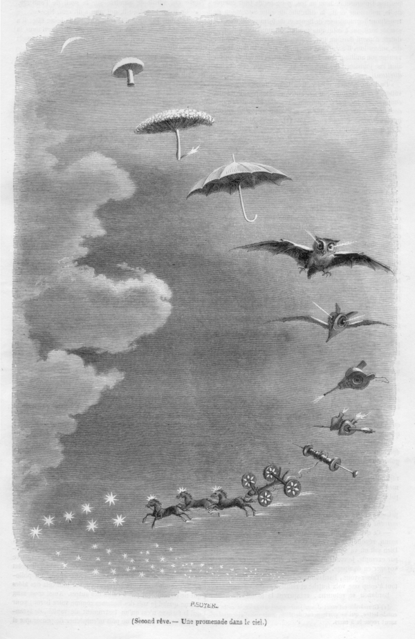 Illustration by J. J. Grandville "Une promenade dans le ciel", Le Magasin pittoresque (1847).